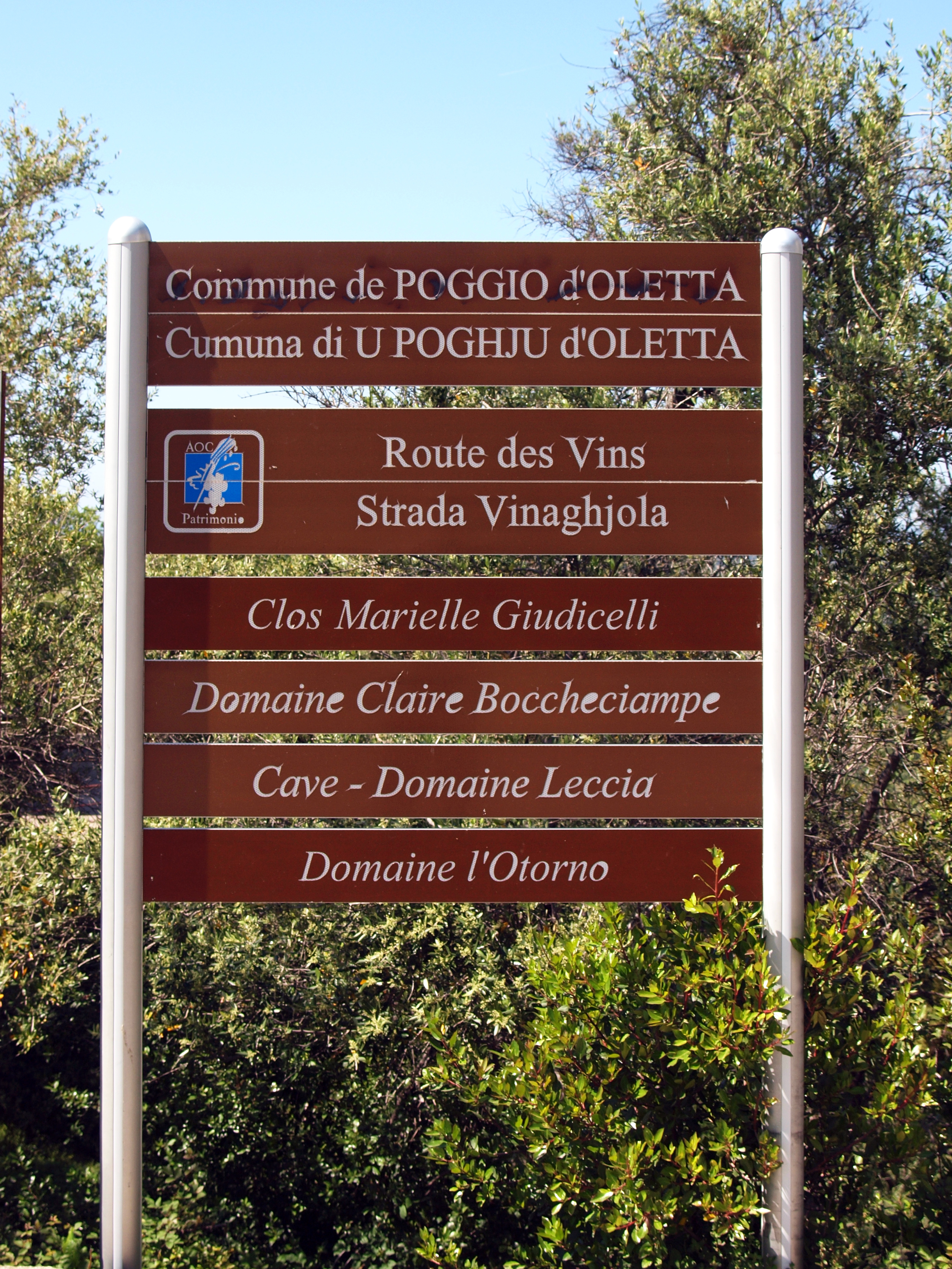 Poggio-d'Oletta, Nebbio (Corse) - Poggio sur la Route des Vins AOC Patrimonio